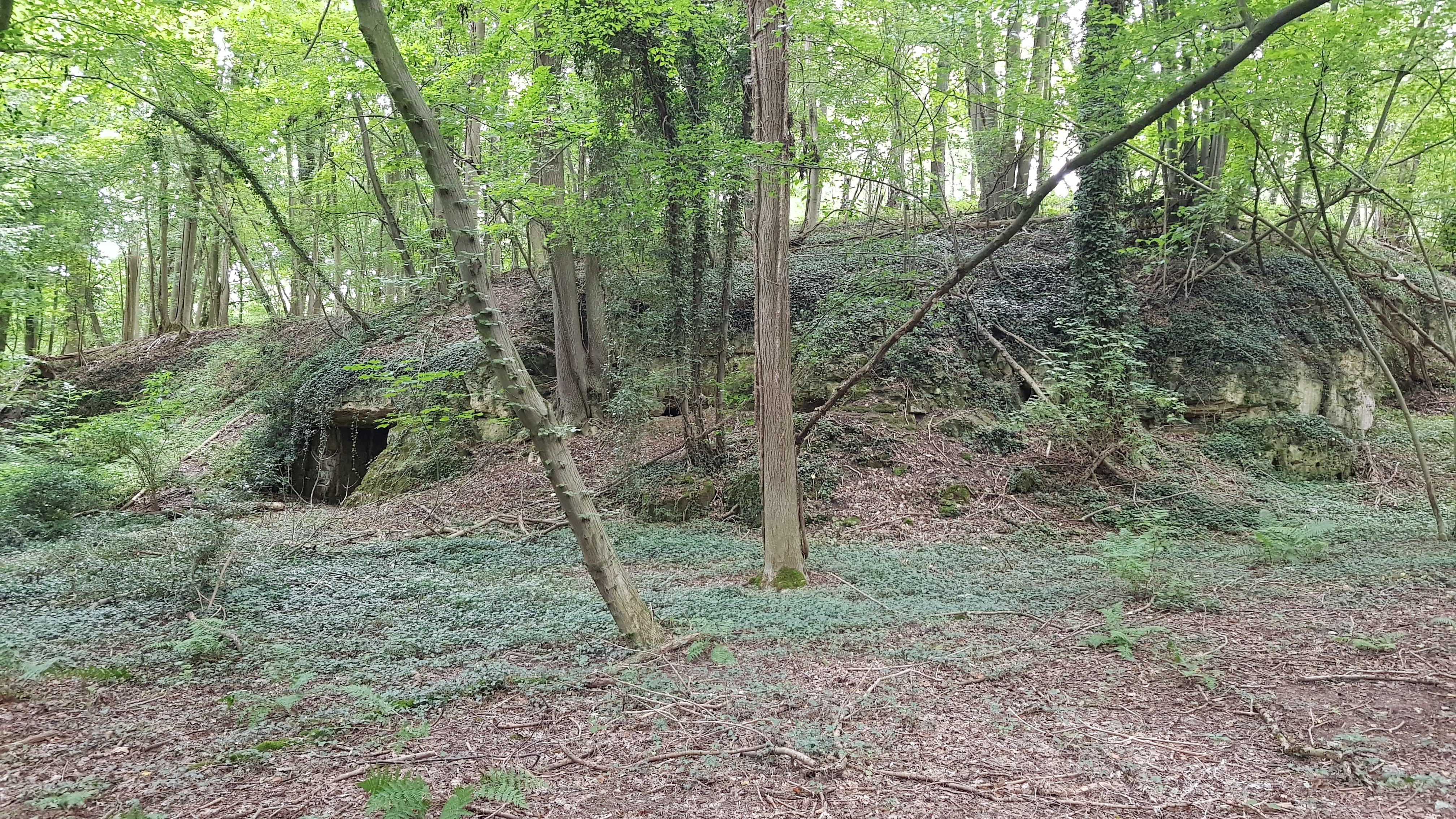 Lebensboschgroeve (links) en Neven Lebensboschgroeve (rechts) in het Savelsbos, Rijckholt, Nederland